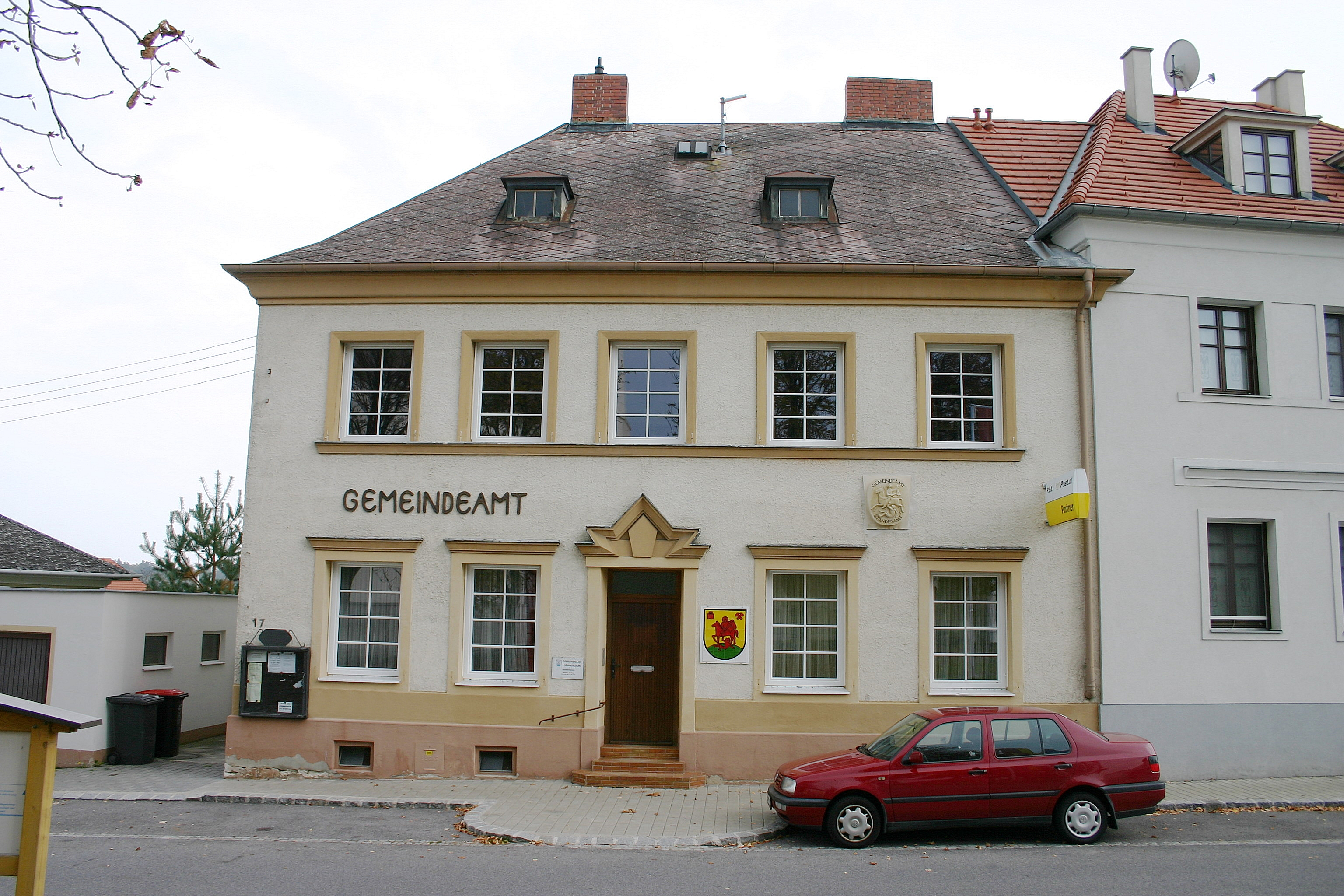 Markt Sankt Martin - Gemeindeamt